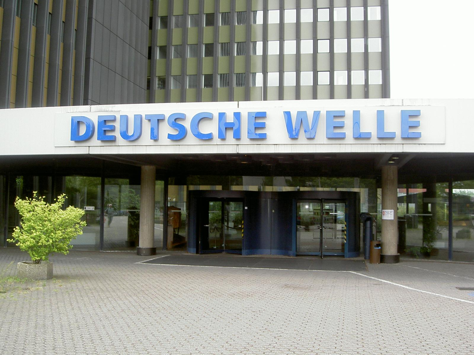 Eingang Der Deutschen Welle In Köln